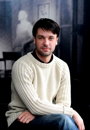 Václav Neužil (nar. 1979) je český herec.